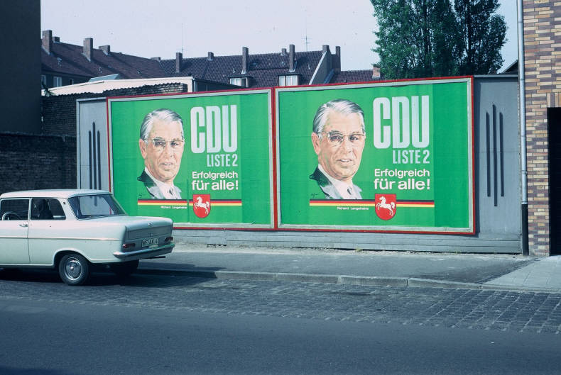 CDU Liste 2 Erfolgreich für alle! Richard Langenheine Abbildung: Porträtfoto - Nationalfarben - Niedersachsenross Kommentar: Außenaufnahme einer Plakatwand Plakatart: Kandidaten-/Personenplakat mit Porträt Objekt-Signatur: 10-008 : 252 Bestand: Landtagswahlplakate Niedersachsen (10-008) GliederungBestand10-18: Landtagswahlplakate Niedersachsen (10-008) » CDU Lizenz: KAS/ACDP 10-008 : 252 CC-BY-SA 3.0 DE